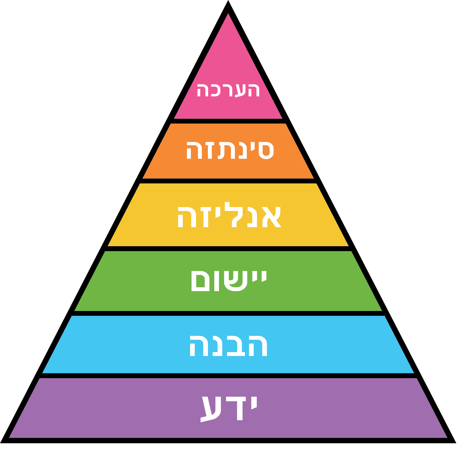 הטקסונומיה של בלום